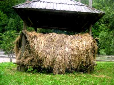 un pajar tipico